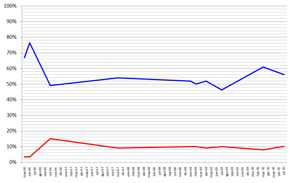 Niveles de aprobación (azul) y desaprobación (rojo) de Ricardo Lagos Ruiz-Tagle según las encuestas realizadas por Eduardo Hamuy, obtenidas aquí